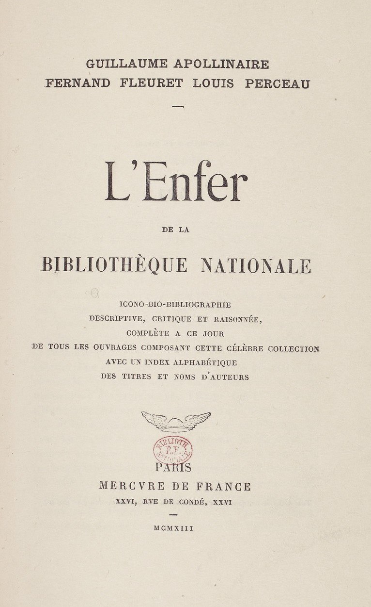 Première de titre du catalogue de l'Enfer de la Bibliothèque nationale